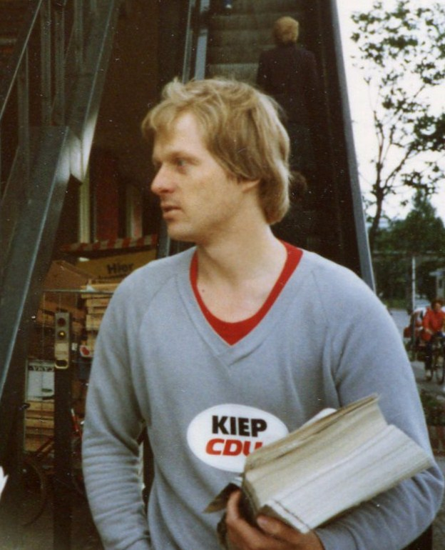 Wahlkämpfer Heino Vahldieck ,1982 in Hamburg-UhlenhorstWahlkämpfer Heino Vahldiek, später Verfassungsschutzchef Hamburg, 1982. Er war Vorsitzender des CDU Ortsvereins Barmbek-Uhlenhorst-Hohenfelde